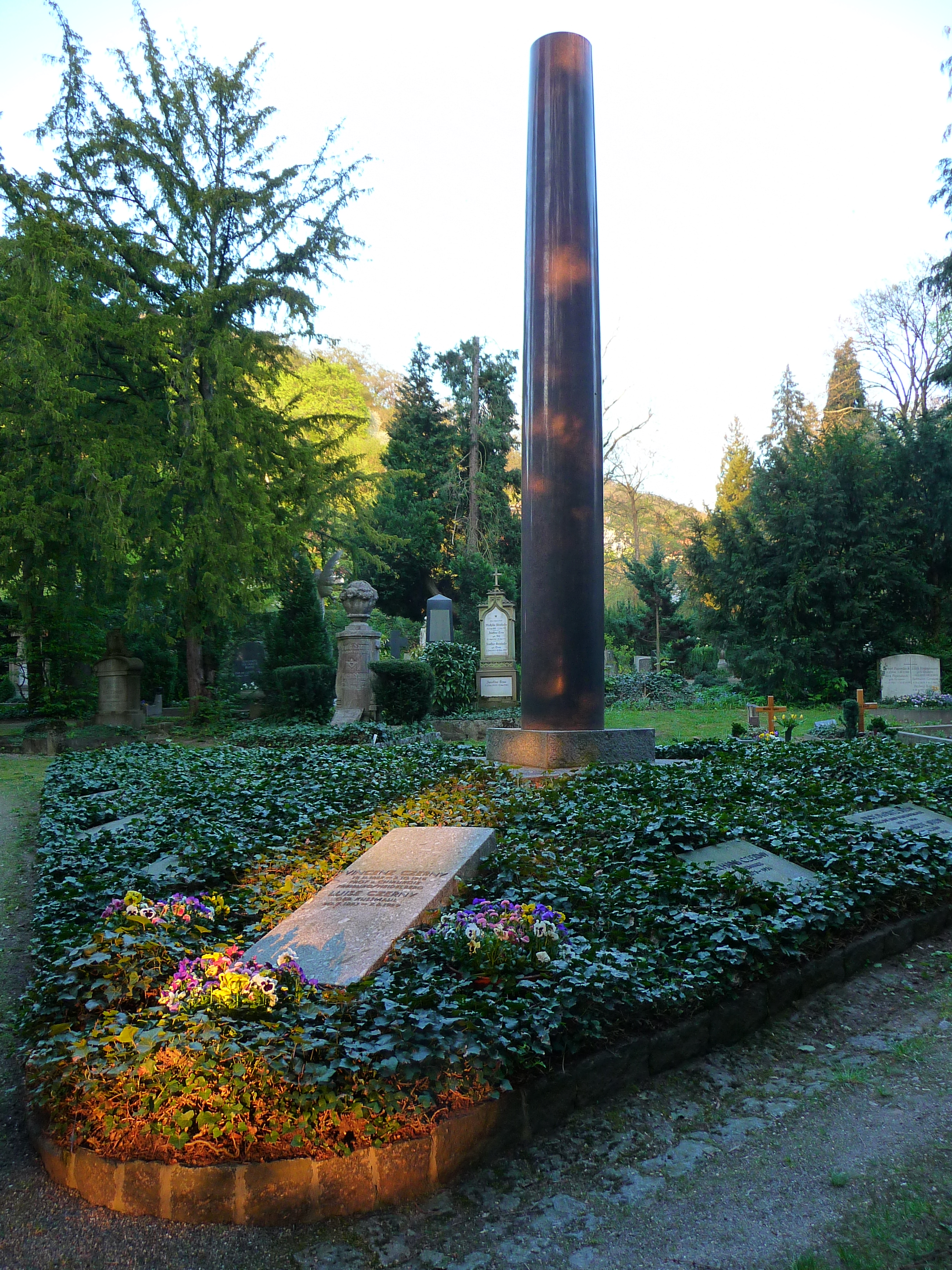 Grabstelle der Familie Czerny auf dem Bergfriedhof in Heidelberg (Baden-Württemberg, Deutschland); hier fand der Professor der Chirurgie Vincenz Czerny (*19.11.1842, gest. 03.10.1916) seine letzte Ruhestätte)